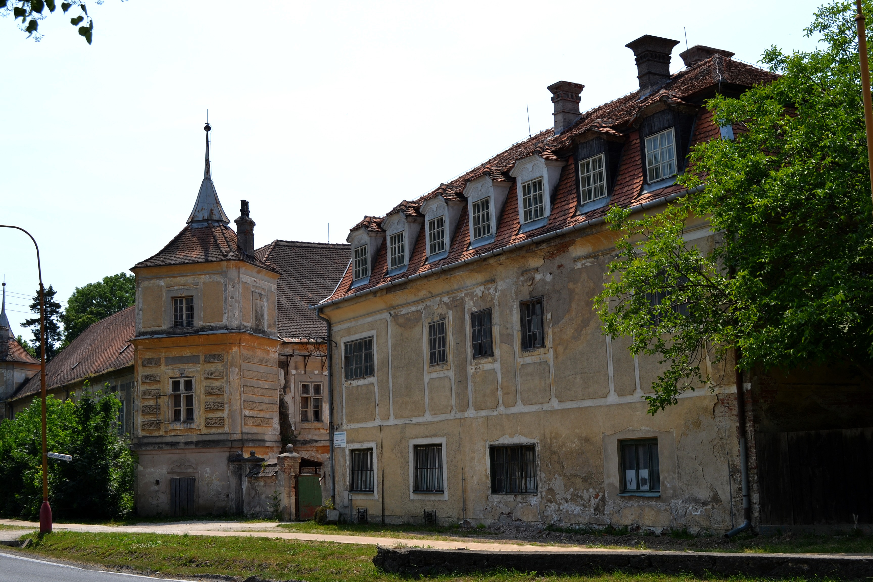 Jablonica (okr. Senica), kaštieľ; celkový pohľad z ulice